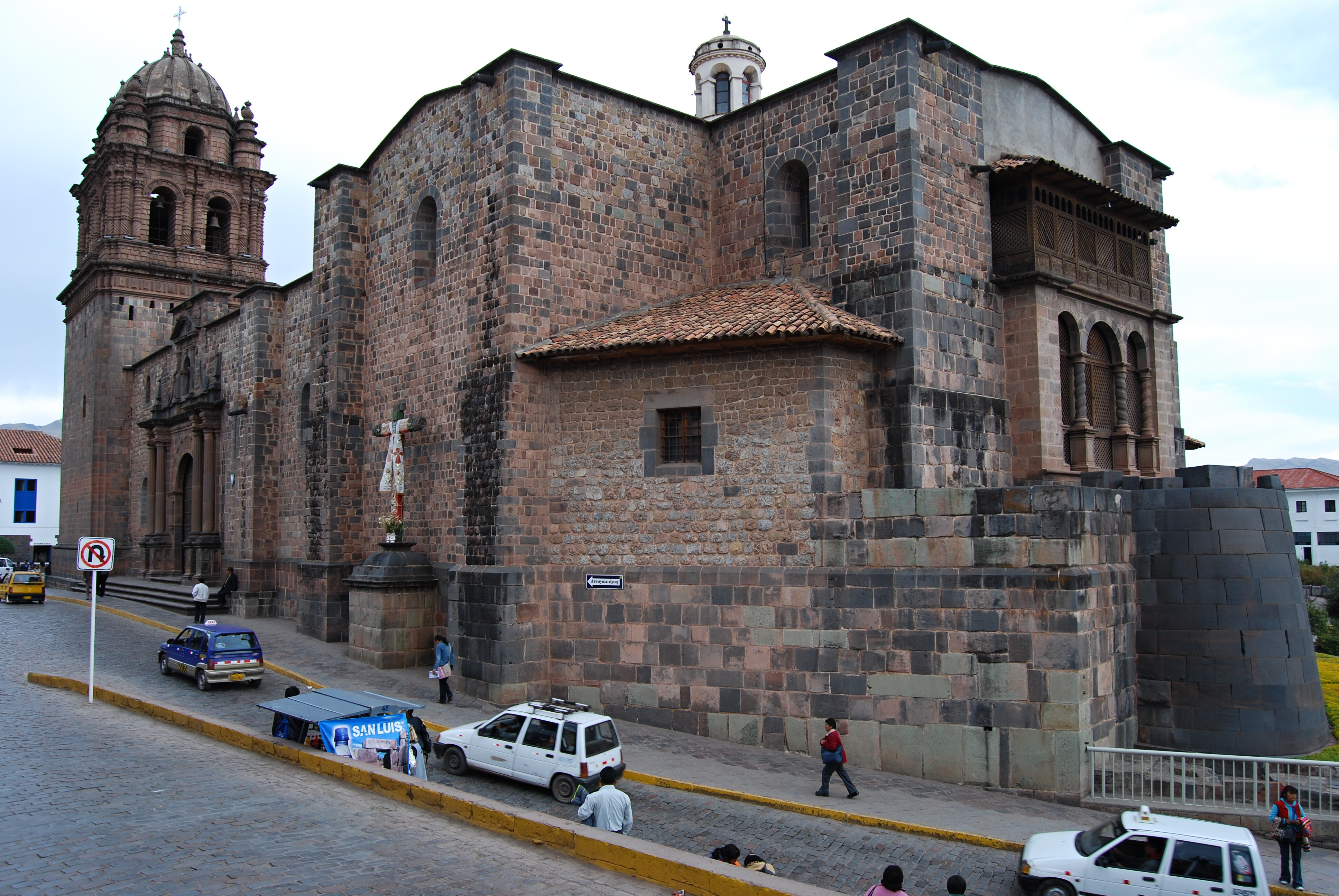 Cusco - Qoricancha